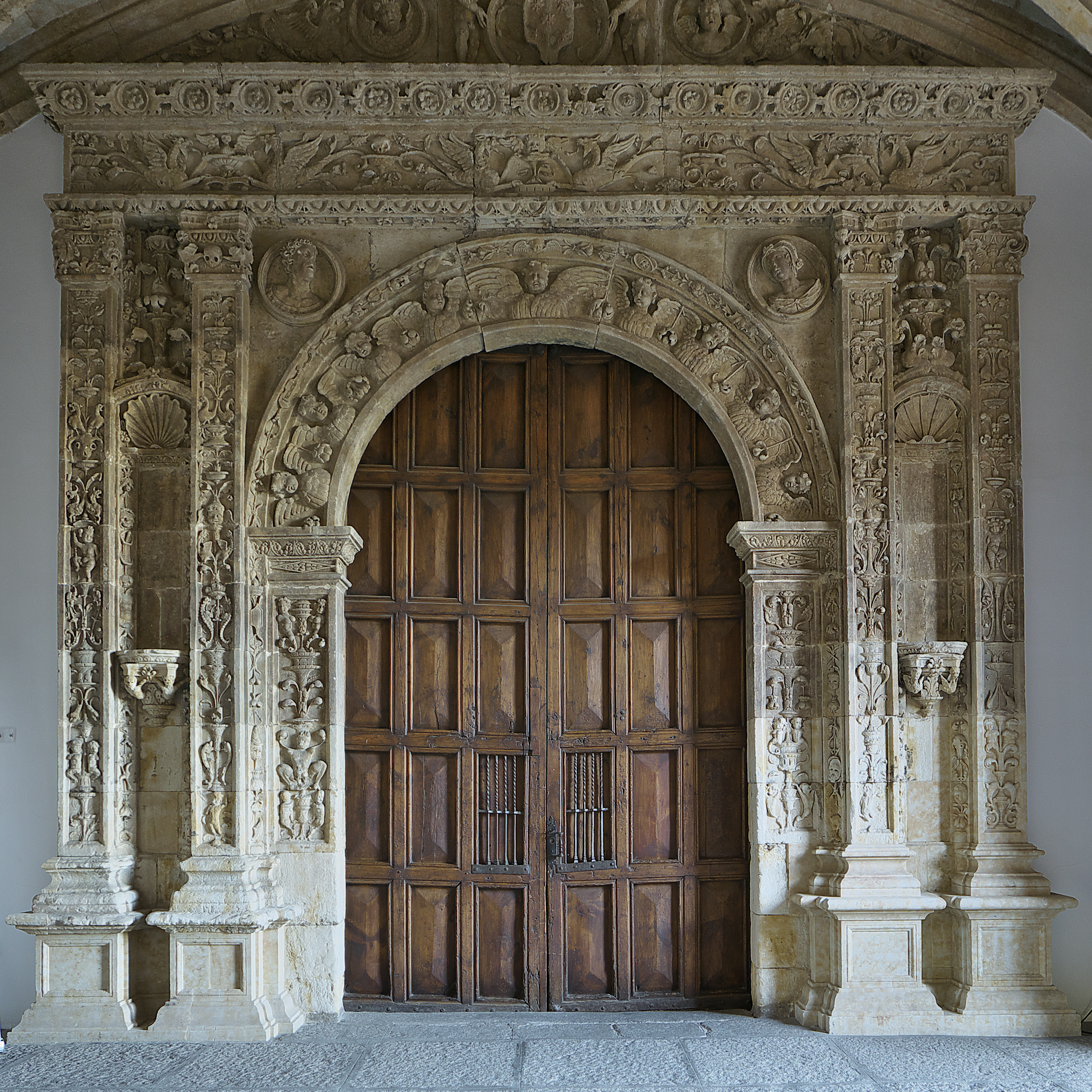 Juan de Ybarra, llamado Juan de Álava, por su nacimiento en esa capital. El arquitecto tardogótico que destacó en el empleo de la decoración plateresca en el primer renacimiento español.